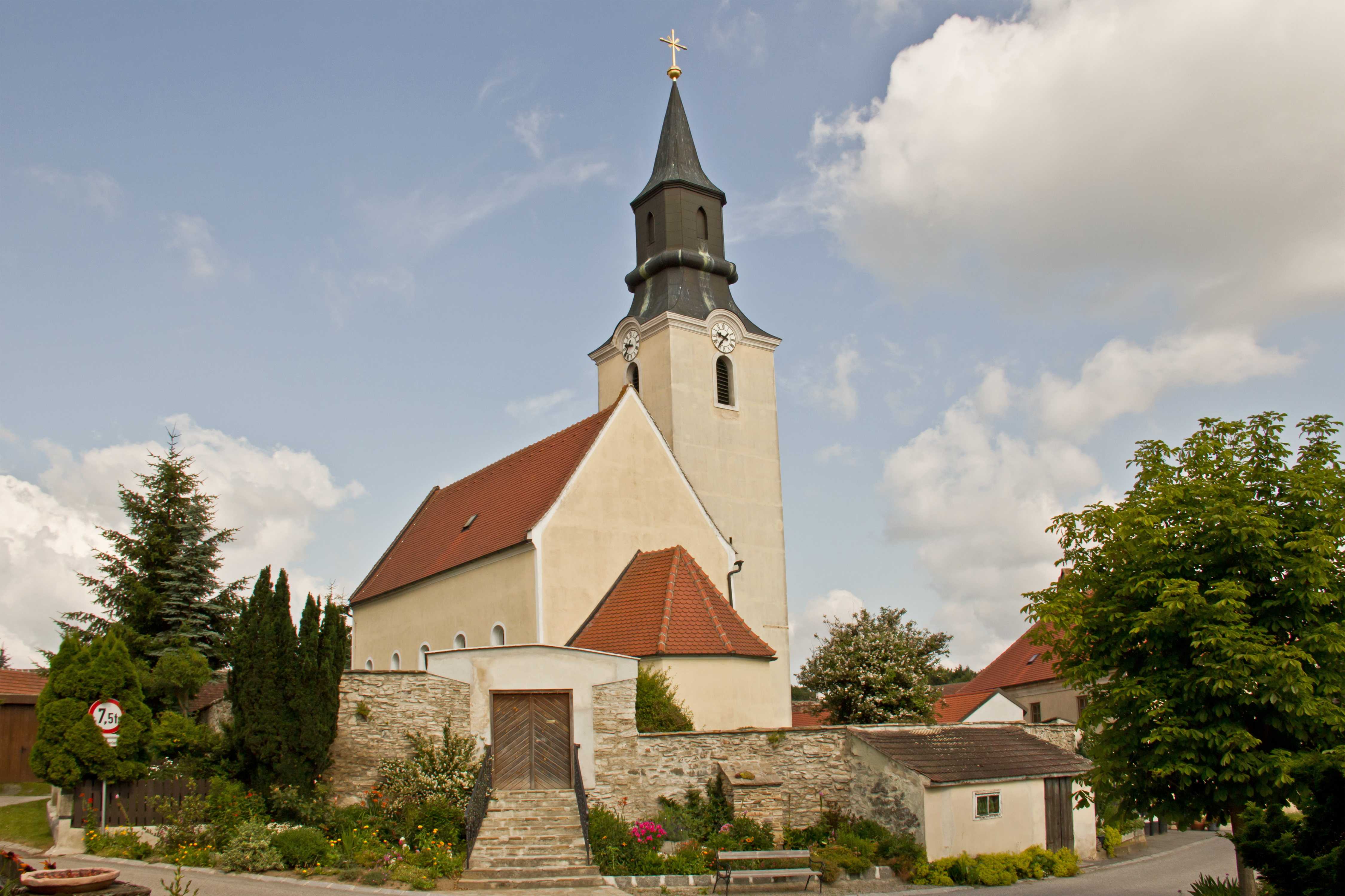 Der ursprünglich romanische Bau wurde im 15. Jahrhundert gotisiert und 1666 barockisiert. Die Kirche ist von einem ehemaligen Friedhof und einer Bruchsteinmauer umgeben.